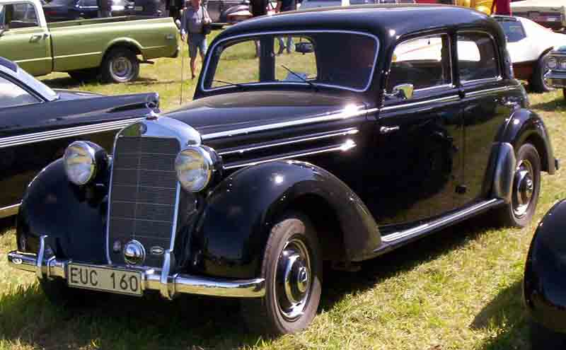 Mercedes-Benz 170S 4-Door Saloon 1950